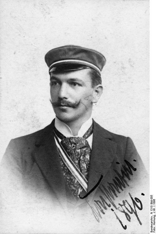 Konstantin von Neurath als Korpsstudent Porträt Konstantin Freiherr von Neurath als Corpstudent in Tübingen Abgebildete Personen: Neurath, Konstantin von Freiherr: Außenminister, Reichsprotektor für Böhmen und Mähren, Deutschland (GND 118786016)